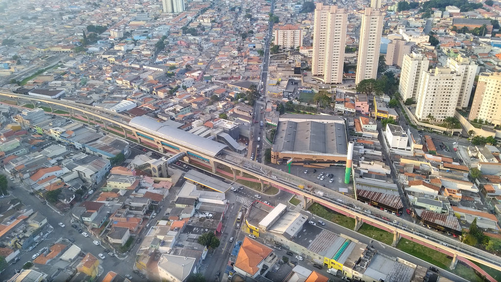 Estação São Lucas da Linha 15 Prata do Metrô de São Paulo em obras. Abril de 2018.